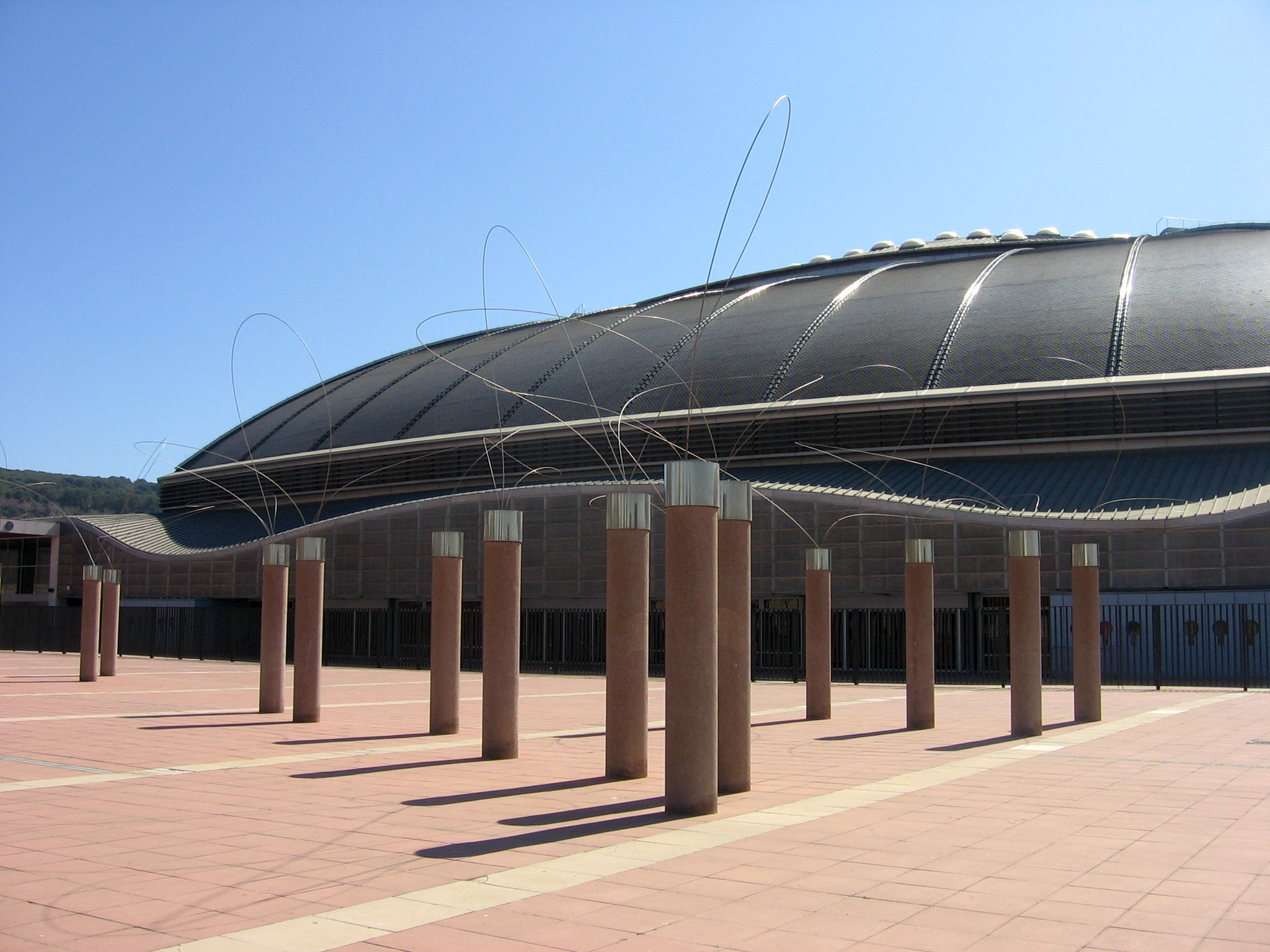 Cambio (Utsurohi), de Aiko Miyawaki, Montjuïc, Barcelona.